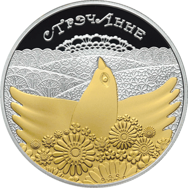 Манета «Стрэчанне. Звычаi i абрады народаў краiн ЕўрАзЭС». Рэверс